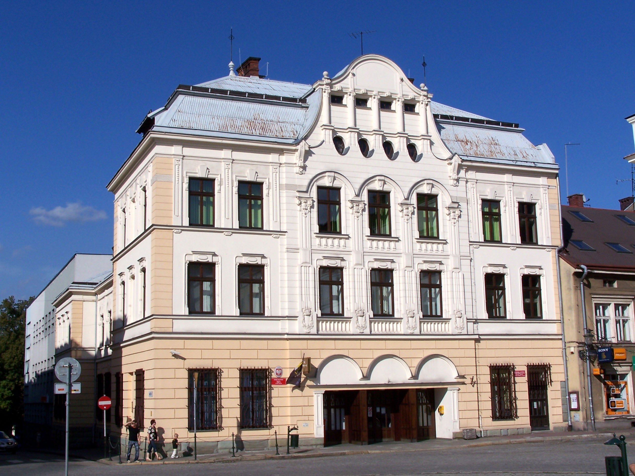 Post office in Cieszyn, Poland. Rynek 13